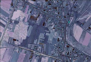 Foto de satélite de Cimanes de la Vega